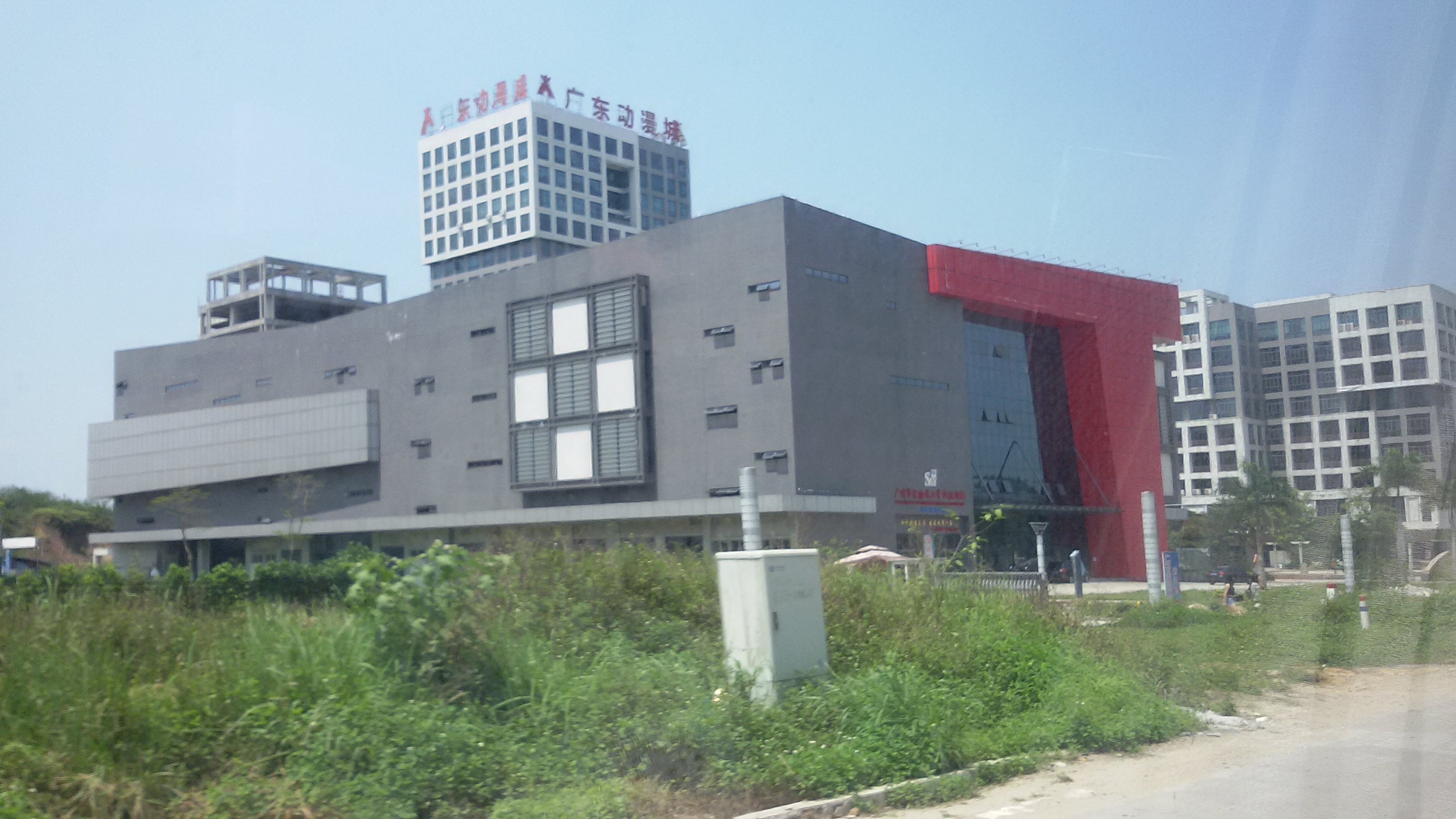 粵語: 喺广东动漫城入面嘅廣州市實驗技工學校